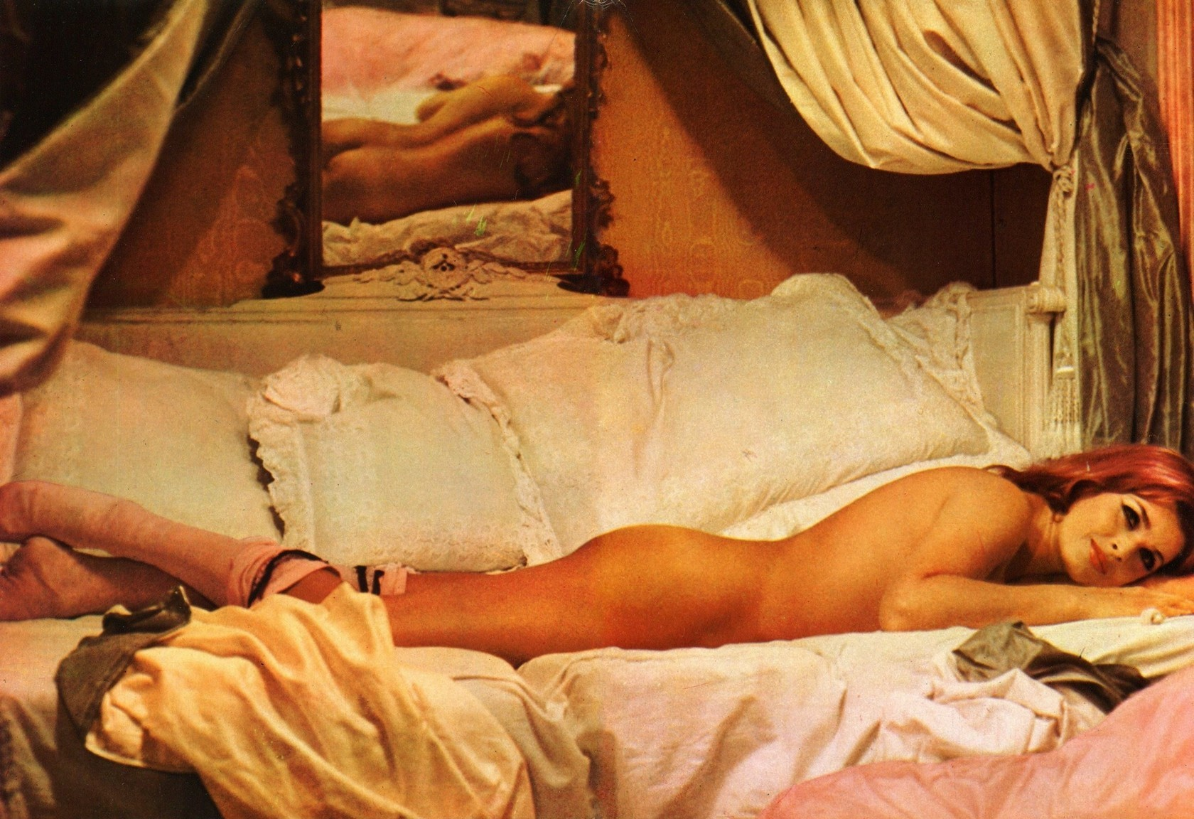 Austrian actress Senta Berger on the set of the Italian movie Giacomo Casanova: Childhood and Adolescence (Infanzia, vocazione e prime esperienze di Giacomo Casanova, veneziano) by Luigi Comencini (1969).